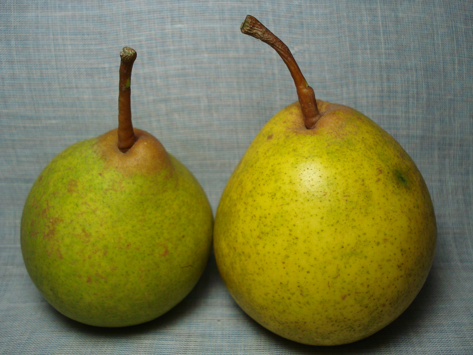 Birne Deutsche Nationalbergamotte, typische Früchte